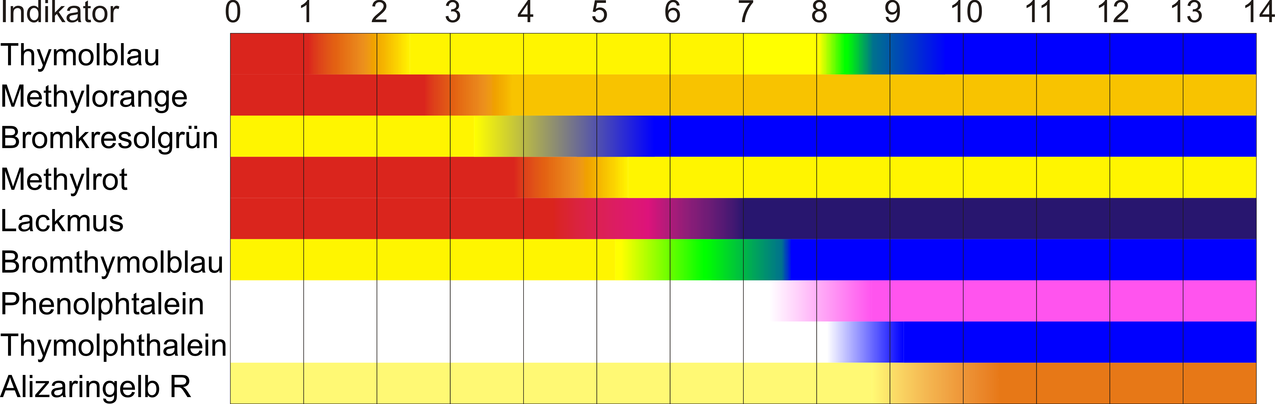 Farbskala Indikatoren